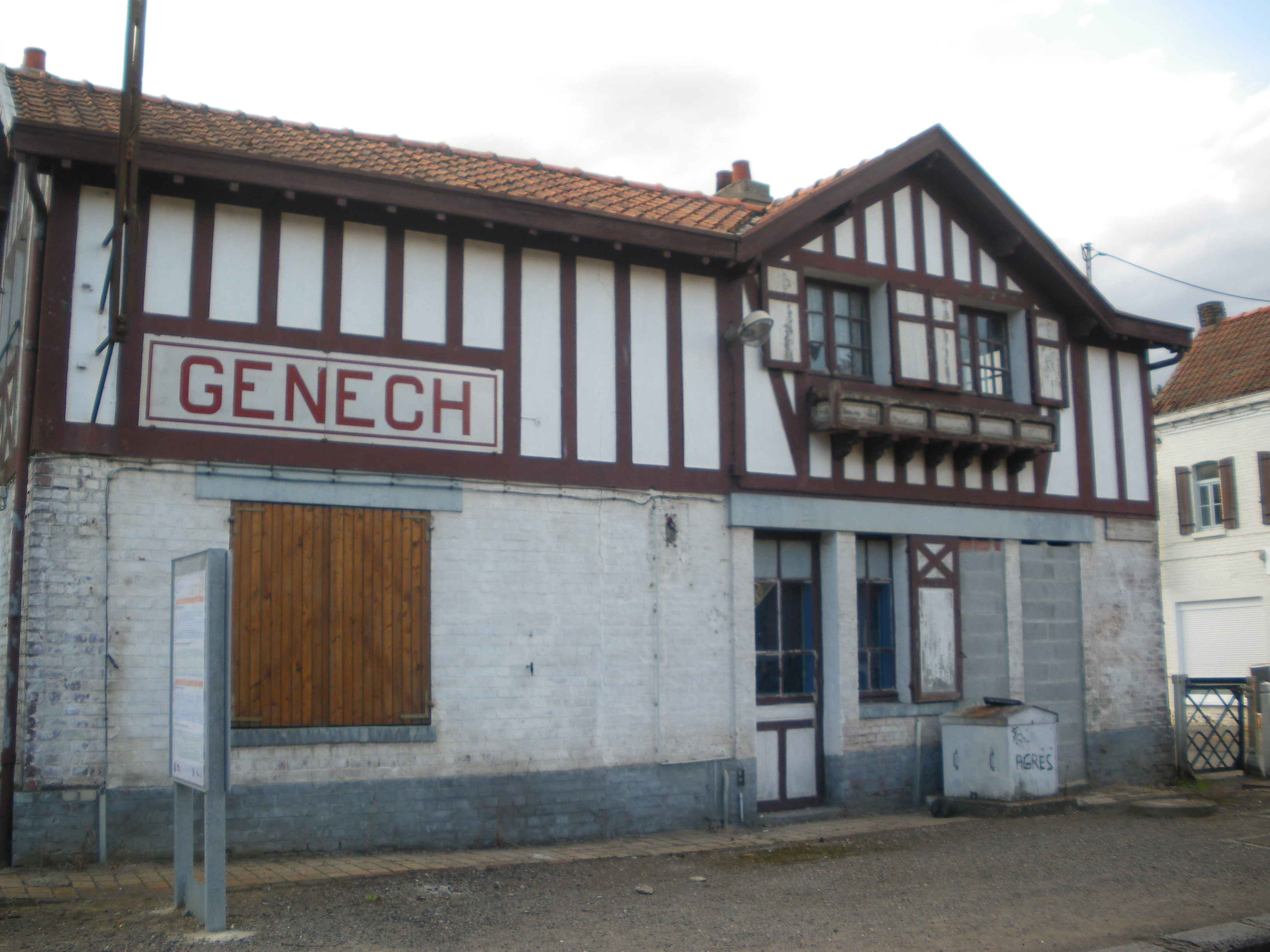 Vue de l'ancien bâtiment principal de la gare de Genech.